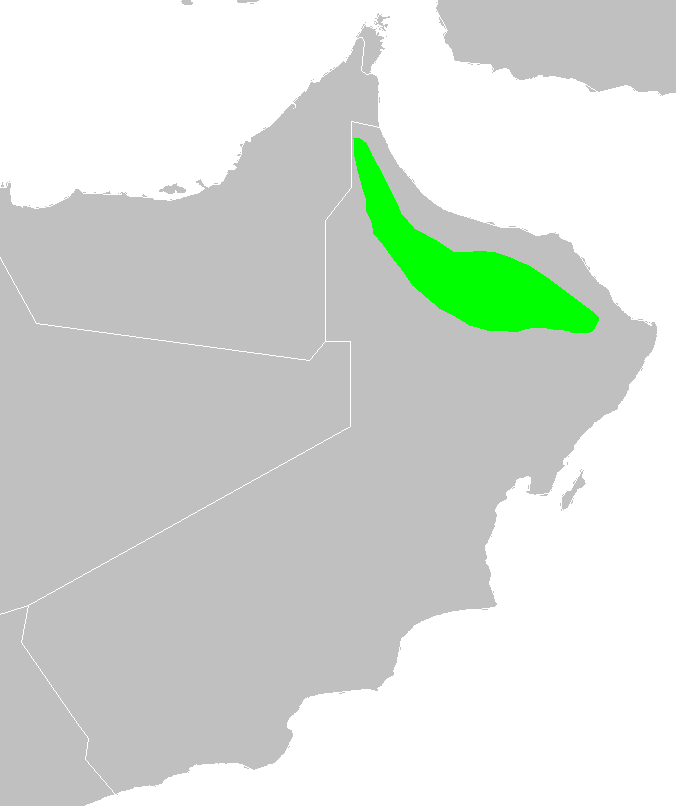 Al Hajar montane woodlands ecoregion map